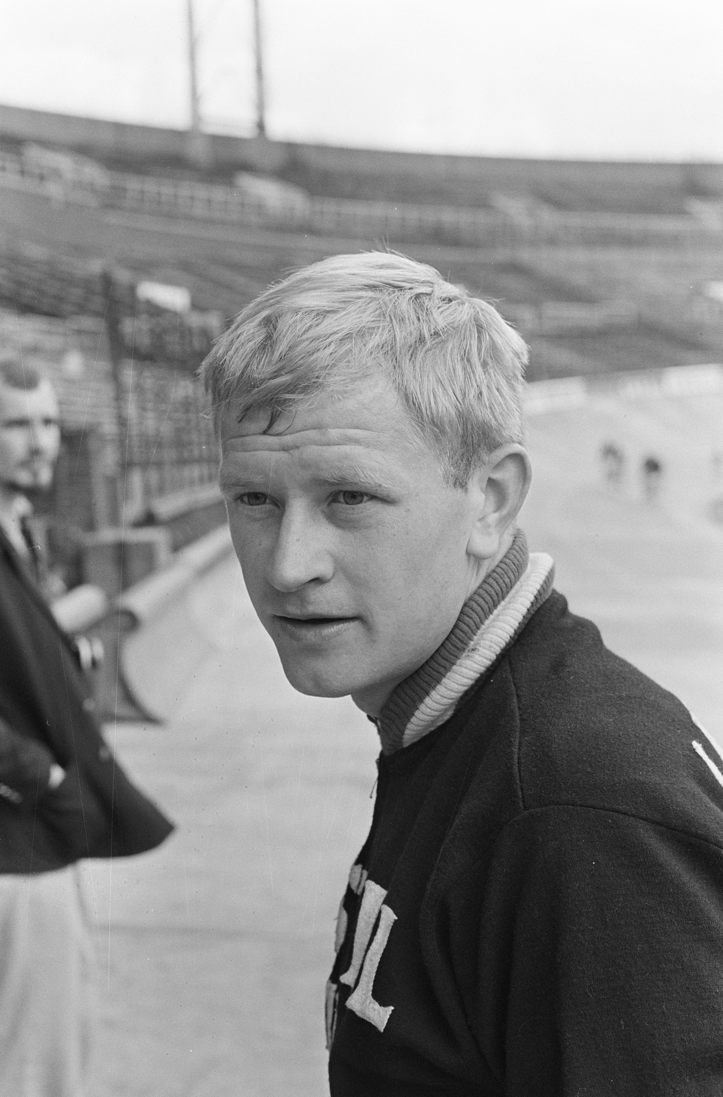 Collectie / Archief : Fotocollectie Anefo Reportage / Serie : [ onbekend ] Beschrijving : Wielrennen, amateurploeg te Nuth, nummer 11 Steevens (kop nummer 12 Leo Duyndam (kop) Datum : 17 augustus 1966 Locatie : Nuth Trefwoorden : WIELRENNEN Persoonsnaam : Duyndam, Leo Fotograaf : Kroon, Ron / Anefo Auteursrechthebbende : Nationaal Archief Materiaalsoort : Negatief (zwart/wit) Nummer archiefinventaris : bekijk toegang 2.24.01.05 Bestanddeelnummer : 919-4595